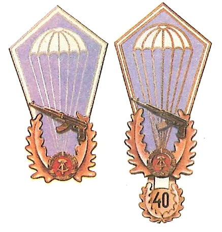 Fallschirmsprungabzeichen der NVA, links Grundversion 1967-1973, rechts für 40 Sprünge 1973-1990.